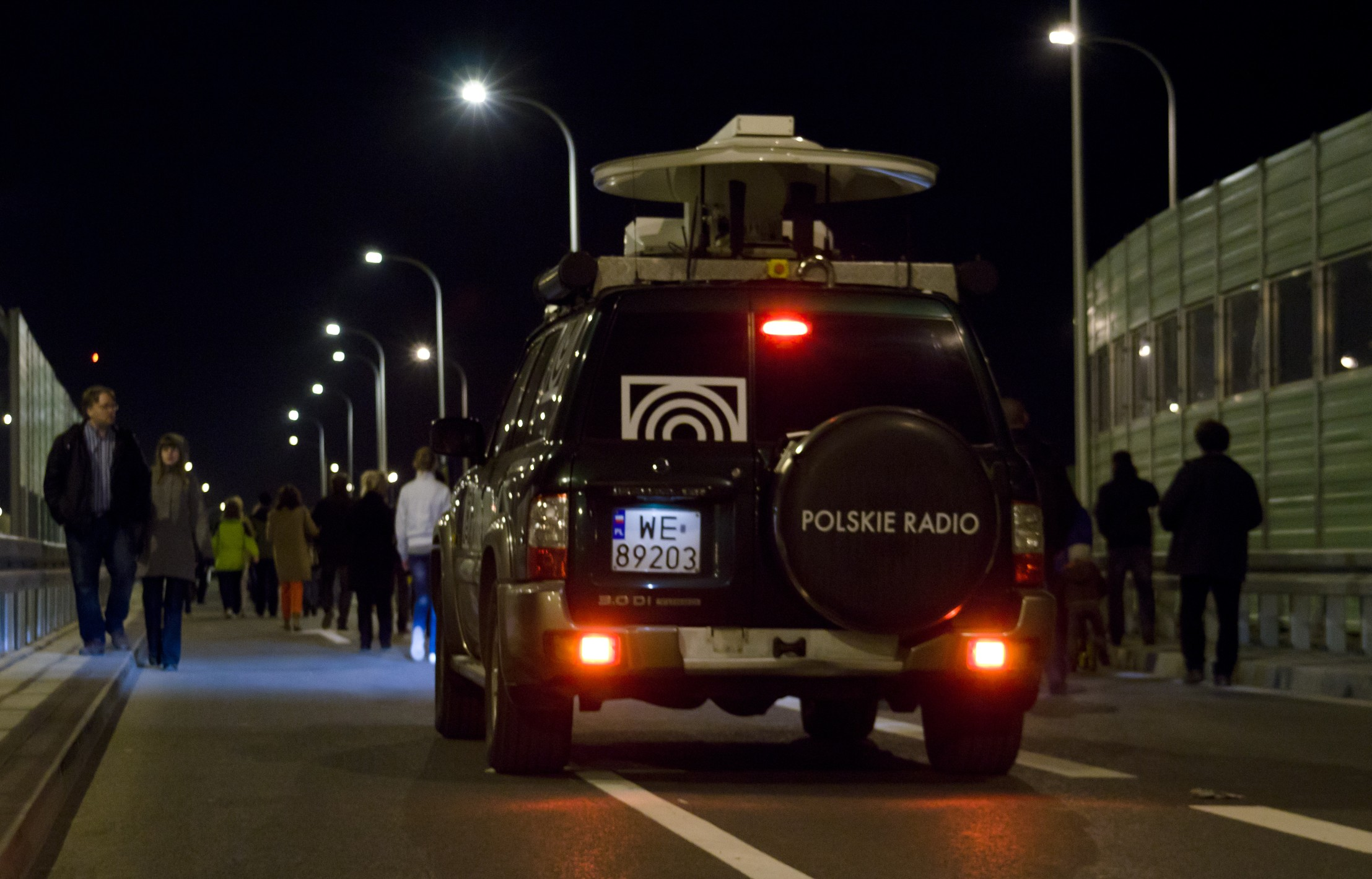 Otwarcie Mostu Marii Skłodowskiej-Curie w Warszawie, 24 marca 2012.